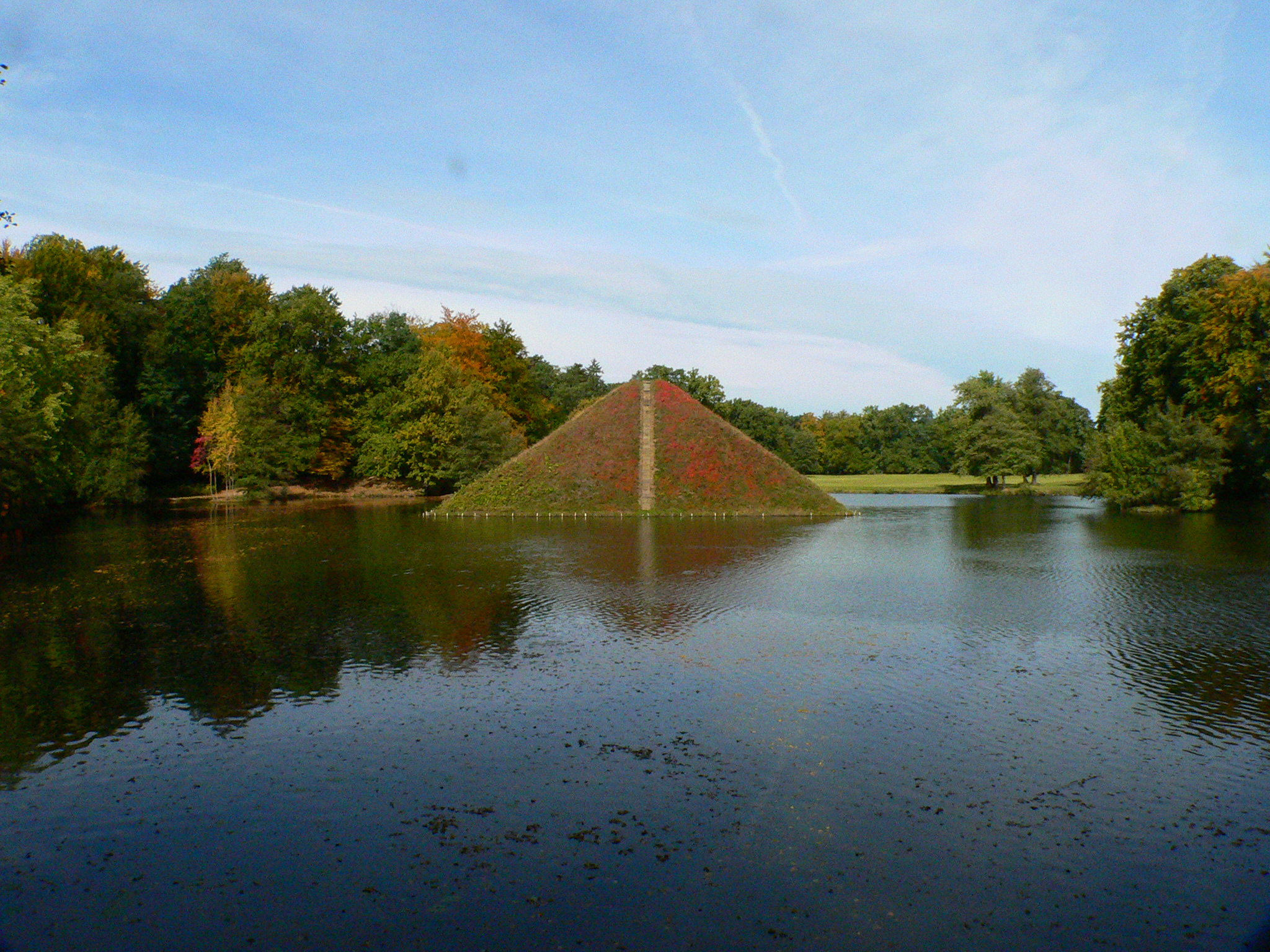 Branitzer Park - Pyramidensee